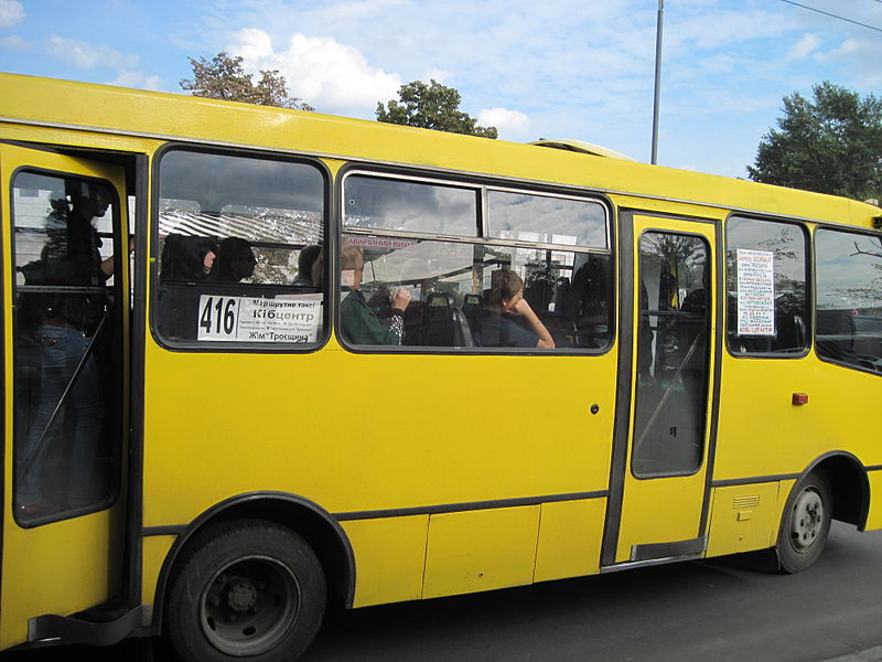 маршрутне таксі № 416 у Києві на вулиці Драйзера